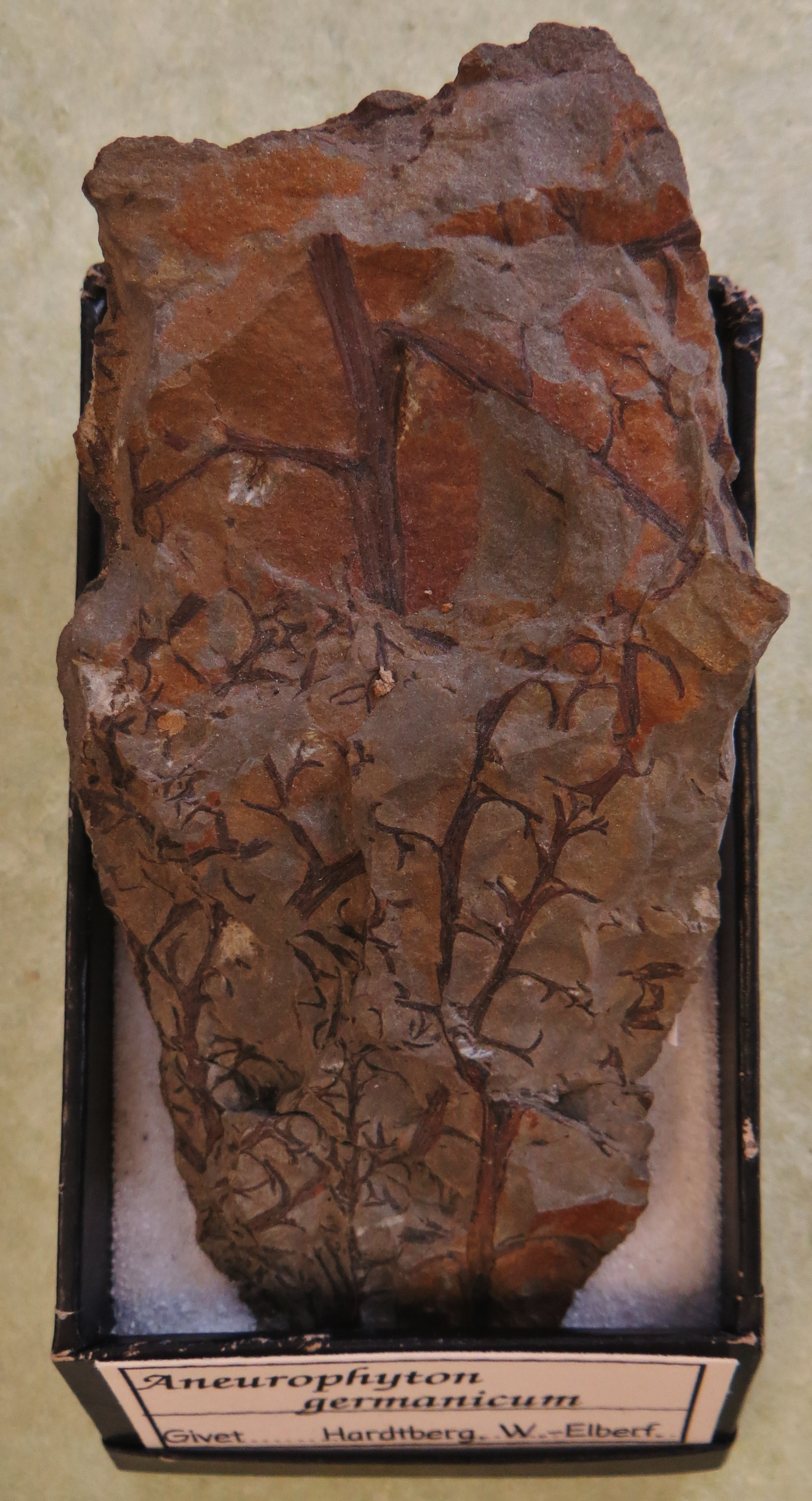 Fossil of plant - Took the picture at Natural History Museum, Bonn University